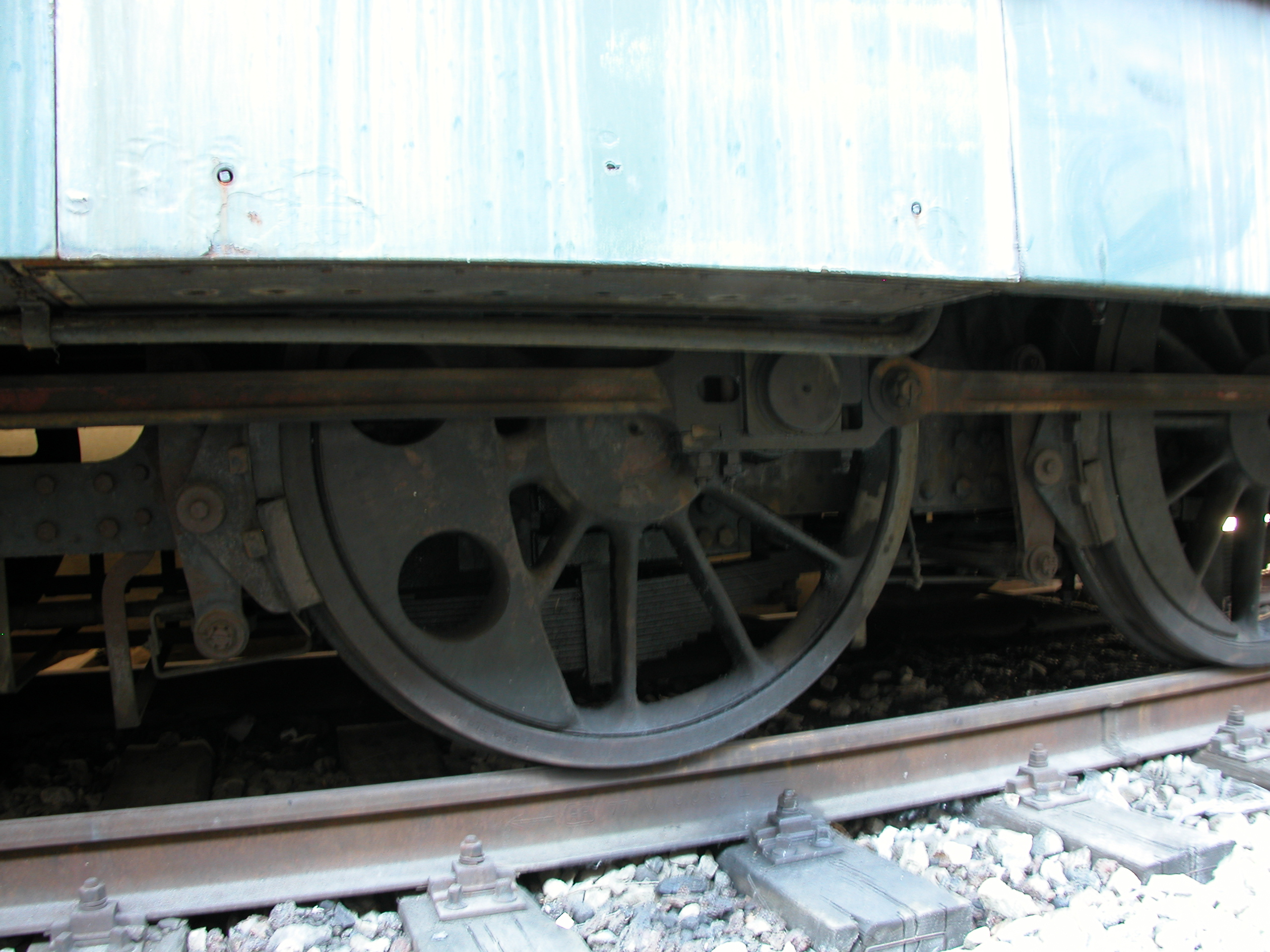 Locomotiva elettrica da manovra FS E.321.003 – Ruota destra della sala centrale con i fori di alleggerimento del contrappeso (rodiggio recuperato dalle locomotive a vapore FS 835).